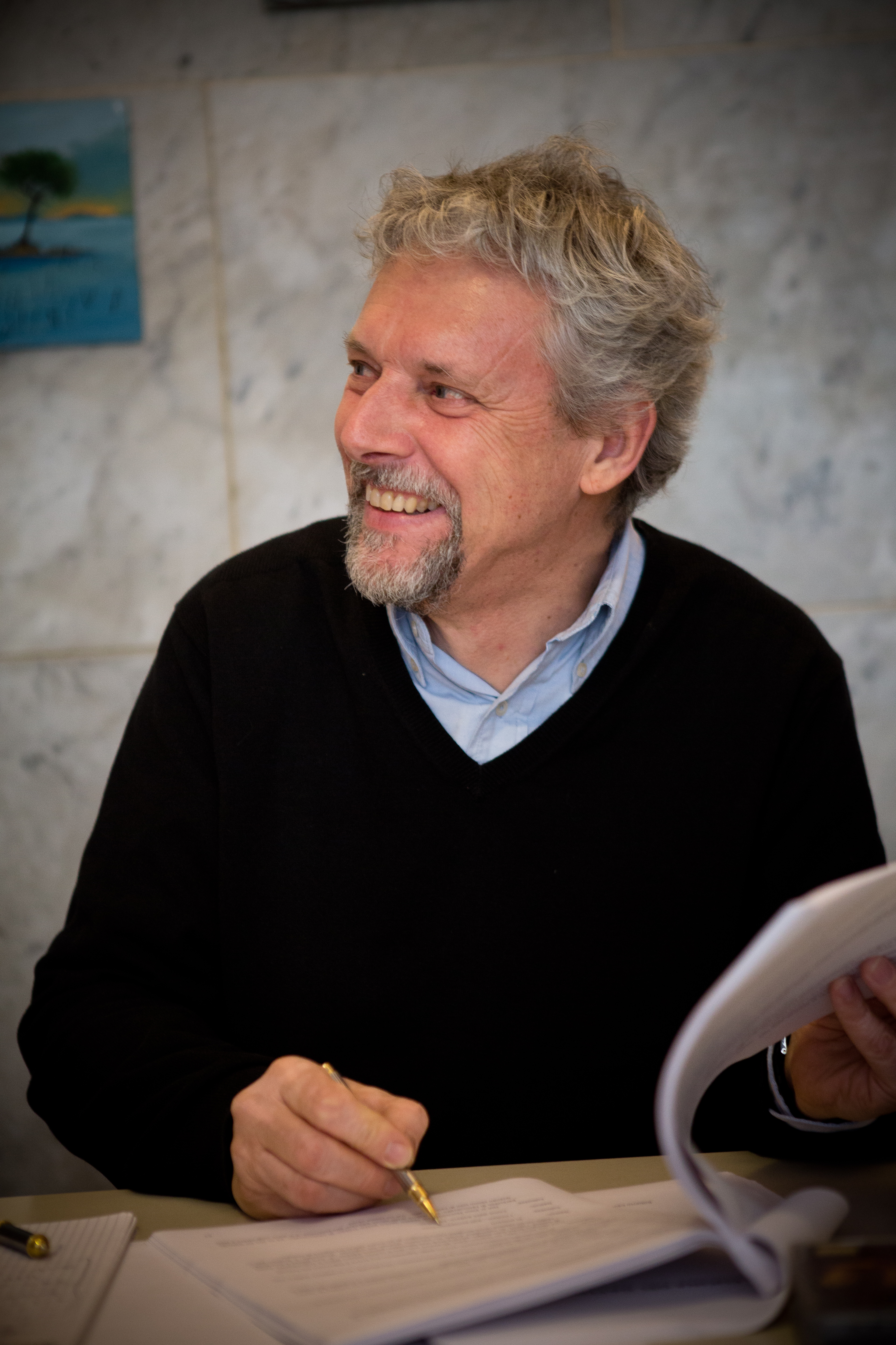 Foto di Roberto Cavosi nel suo studio.